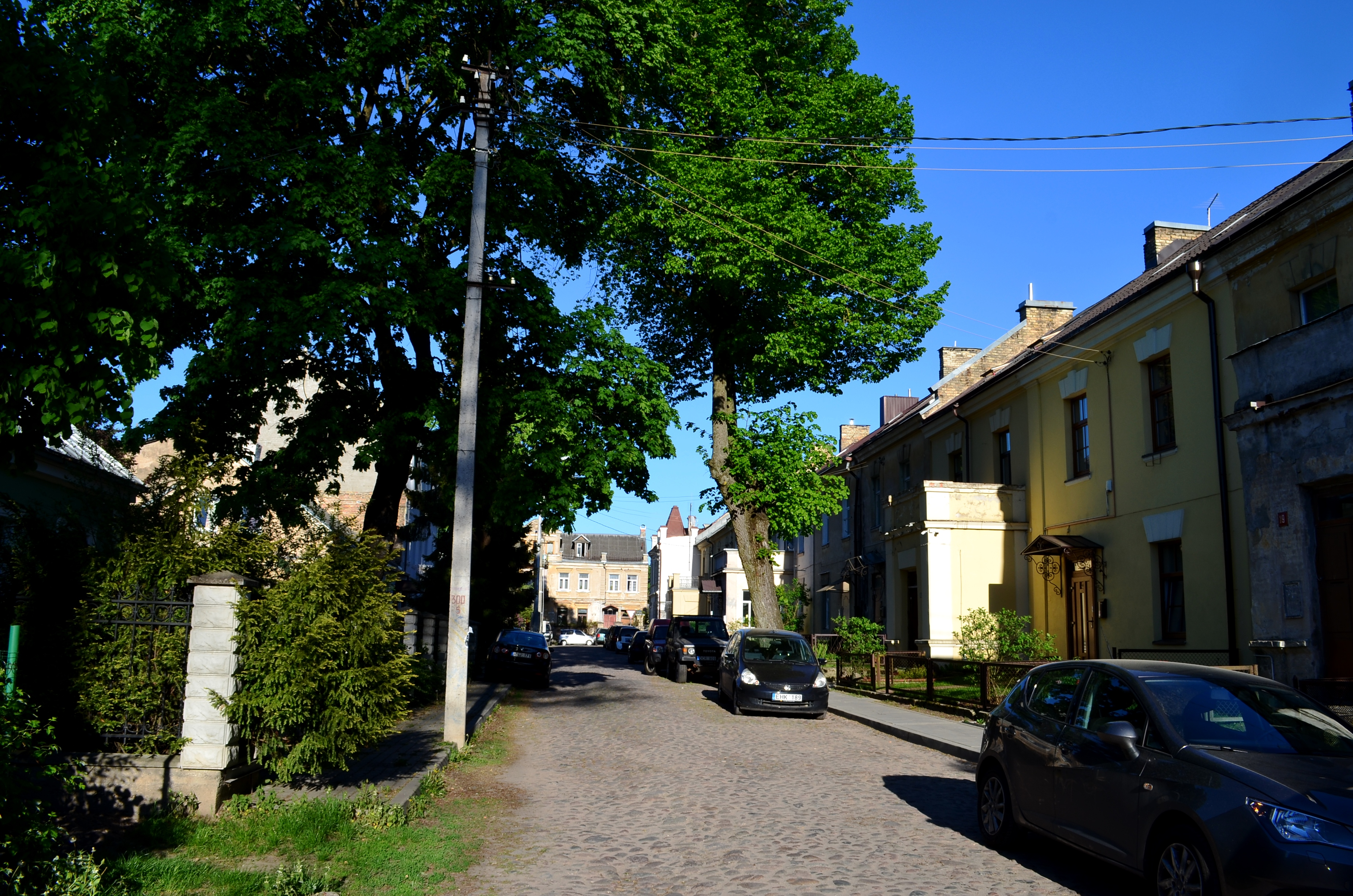 Švenčionių gatvė, Rasų Kolonija, Vilnius